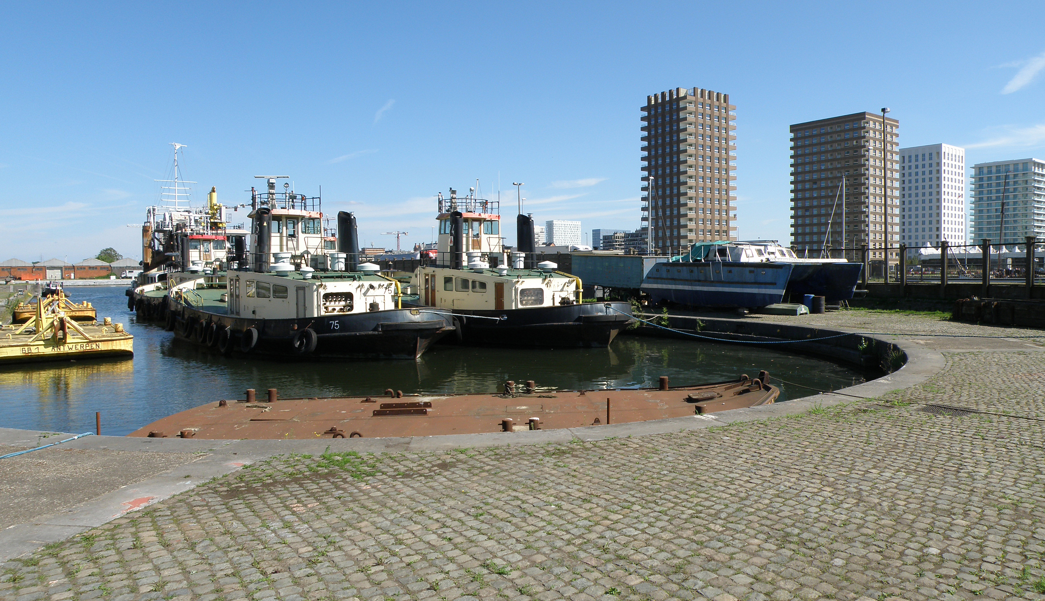 Antwerpen (België). Kattendijkdok.